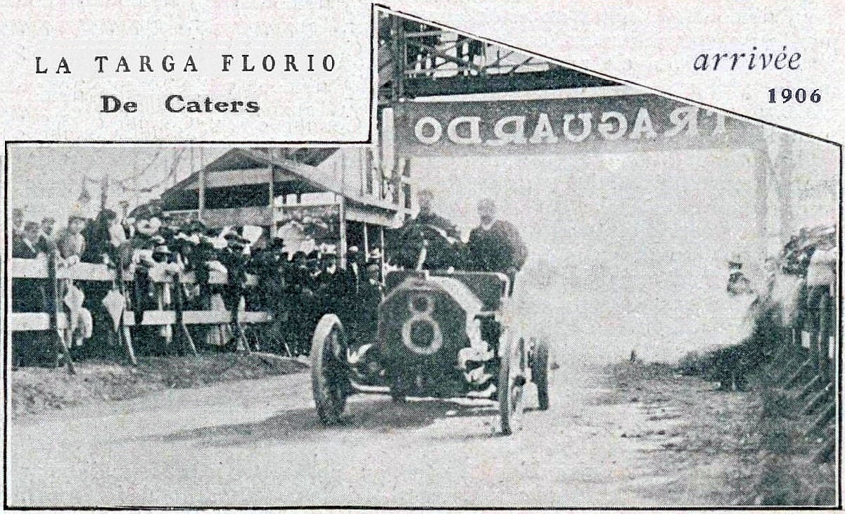 Arrivée de la première Targa Florio 1906 (Pierre de Caters sur Itala 35/40, le 6 mai) - La Vie au Grand Air du 18 mai 1906, p.378